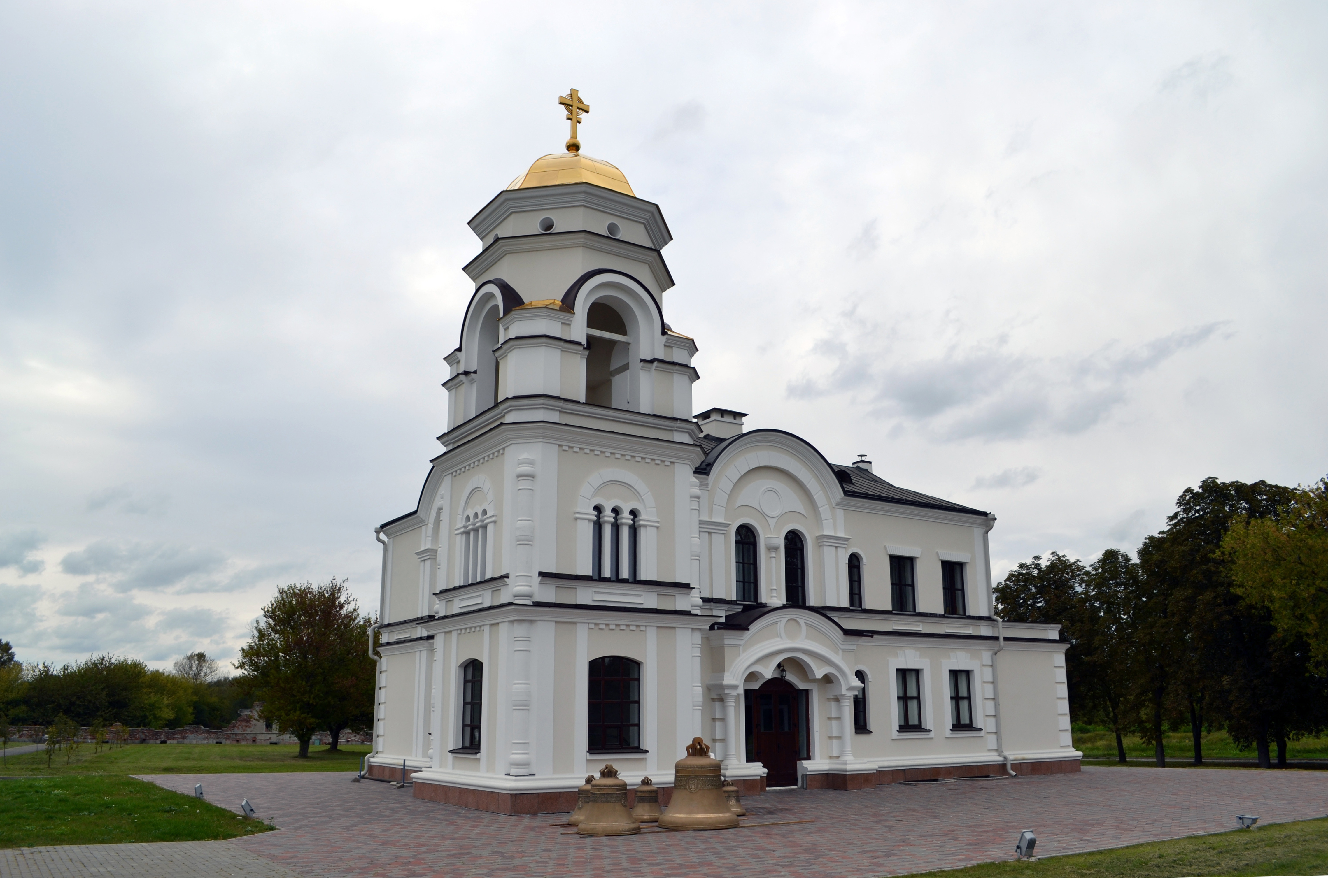 Беларуская (тарашкевіца): Мікалаеўская царква. м. Берасьце This is a photo of Belarusian heritage monument. Reference number: 113Г000005 ( WLM)